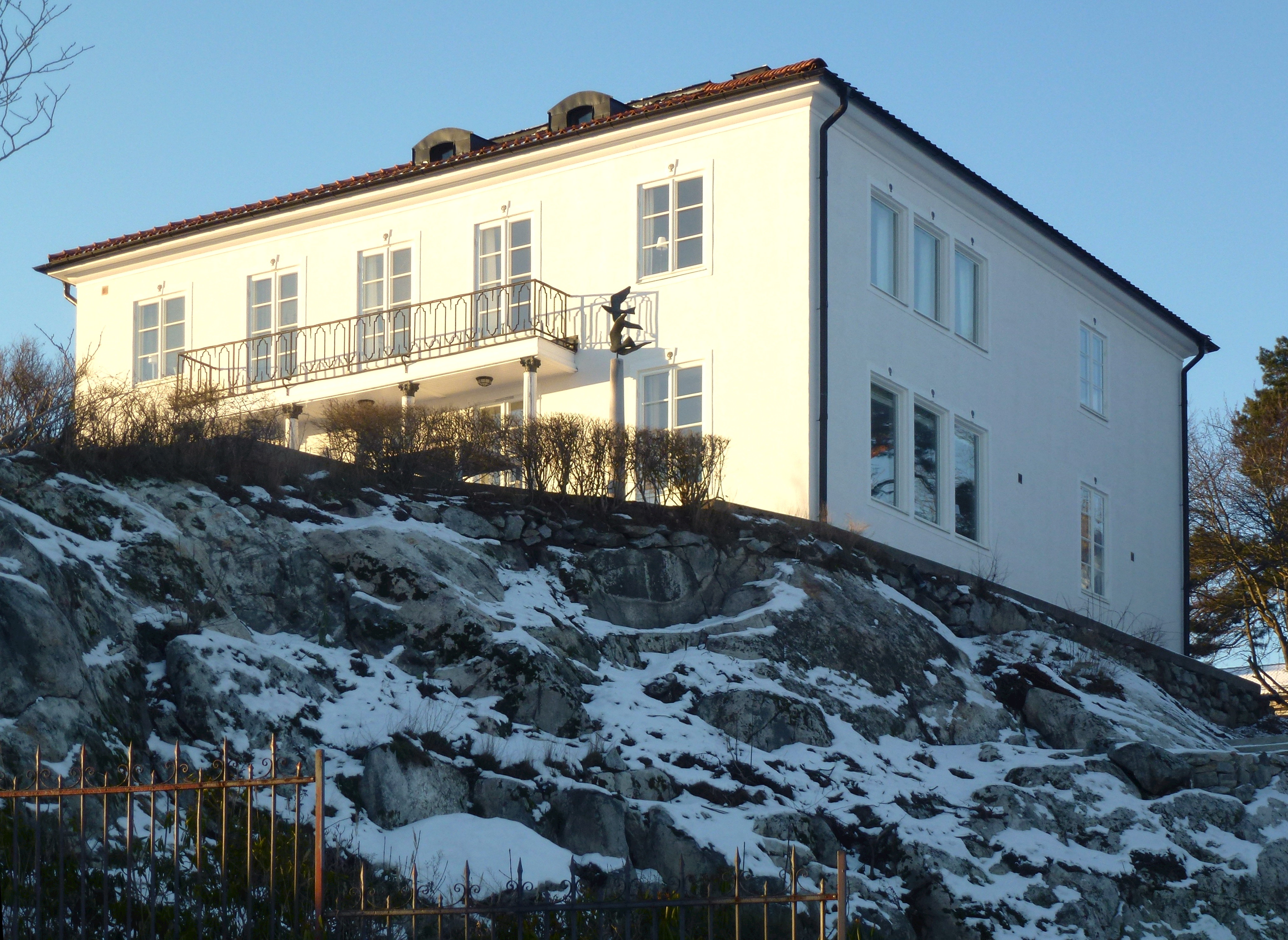 Villa Alphyddan Djursholm, Strandvägen 15, ursprungsarkitekt J.A. Nordström, ombyggnad Karl Güettler